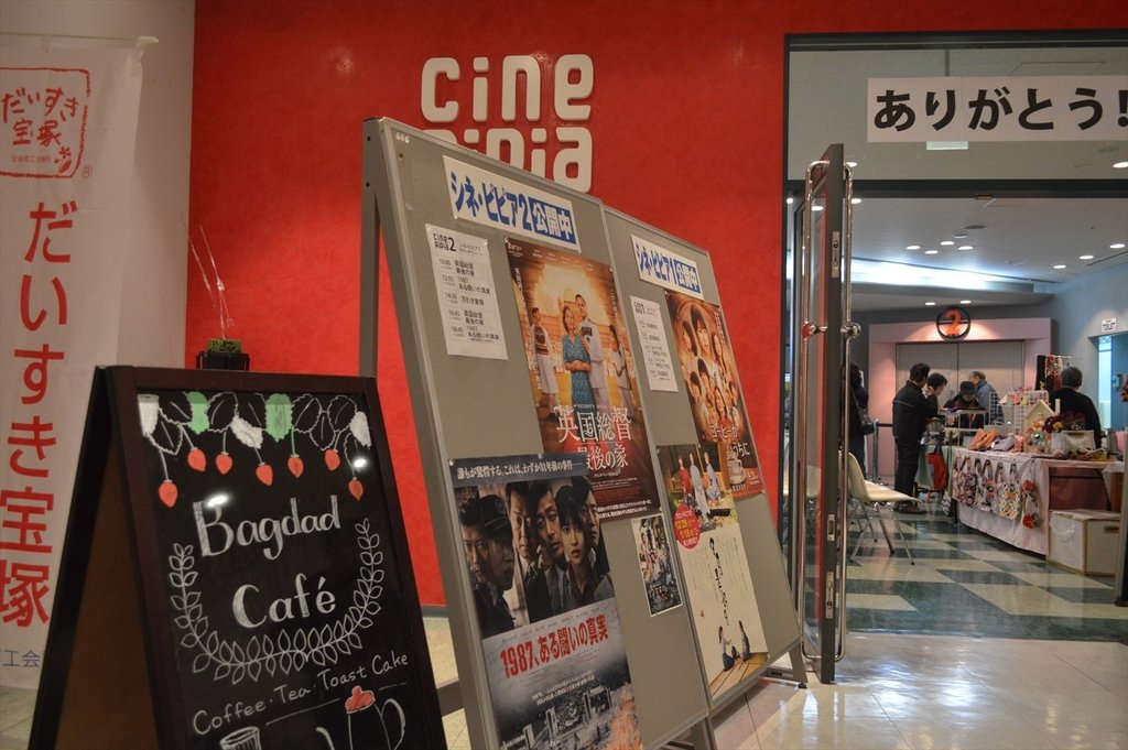 兵庫県宝塚市のピピアめふにある映画館「シネ・ピピア」。